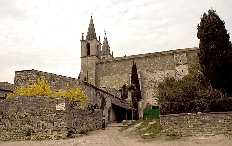 Eglise à Goudargue de sud-est.